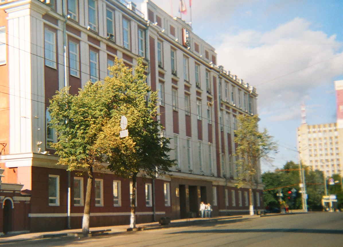 Администрация города Перми